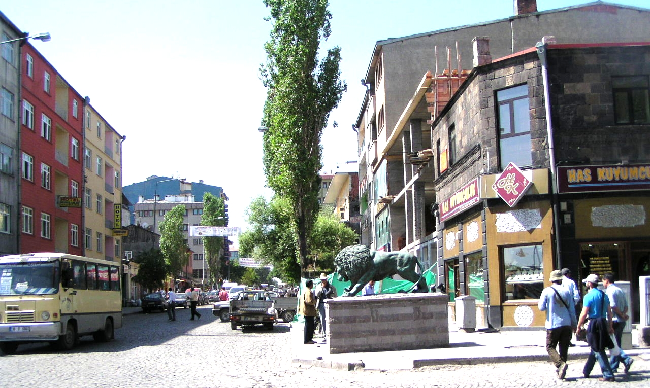 Kars. Sehir icinde. Ben cektim The weaver 13:53, 24 Haziran 2006 (UTC) (temmuz 2005)